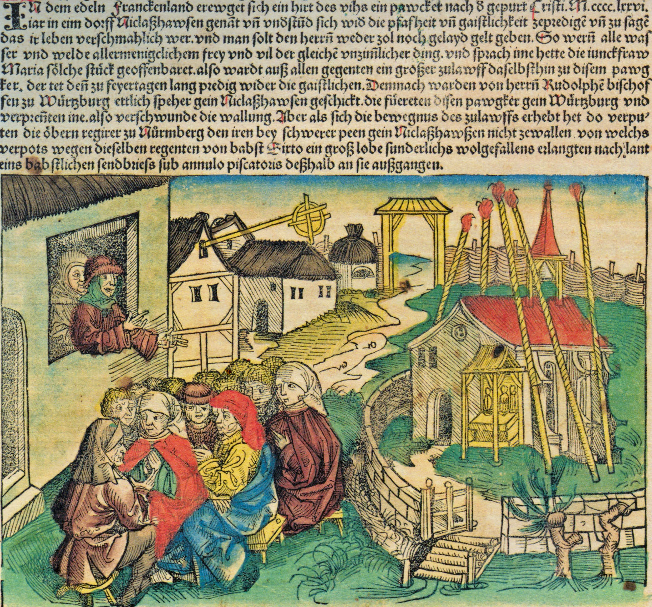 Pawcker von Niclashawsen Bericht der Schedelschen Chronik Blat CCLV Bericht und Abbildung